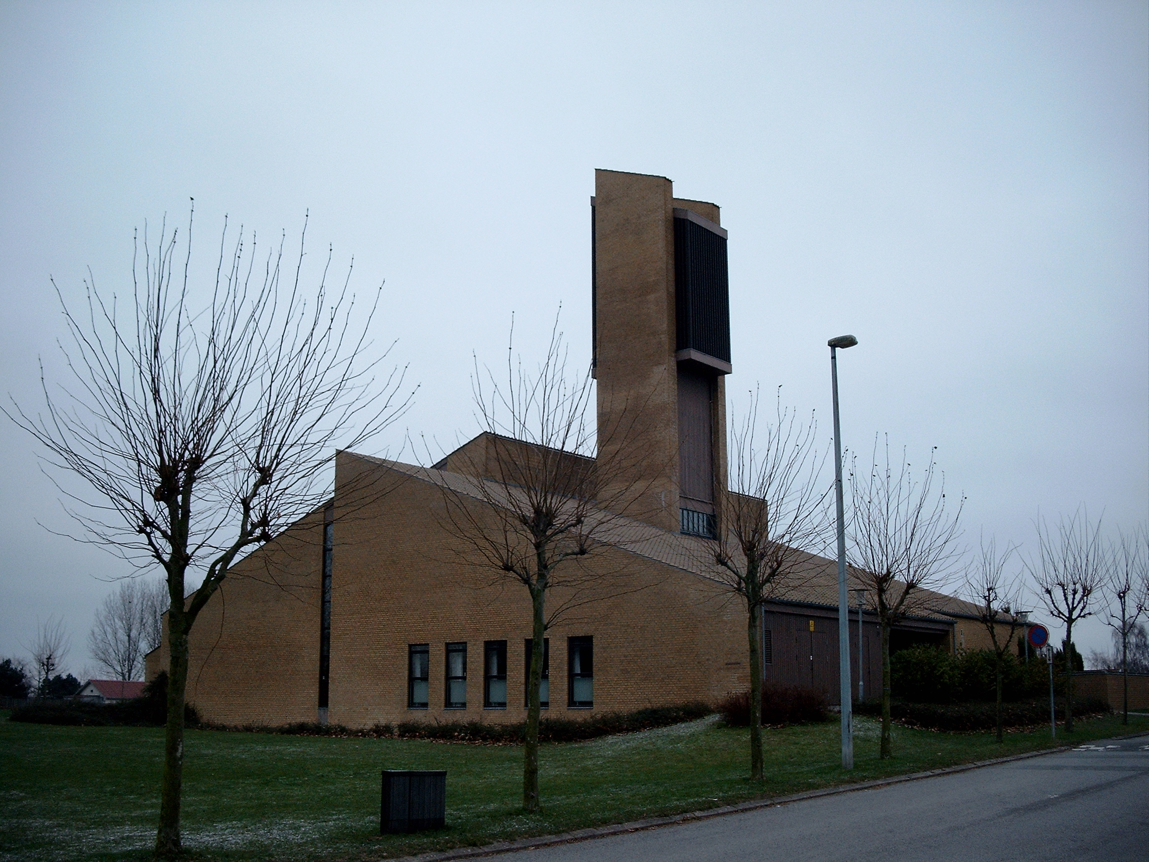 Dyrup kirke, Dyrup sogn, Odense Kommune (former: Odense Herred, Odense Amt).